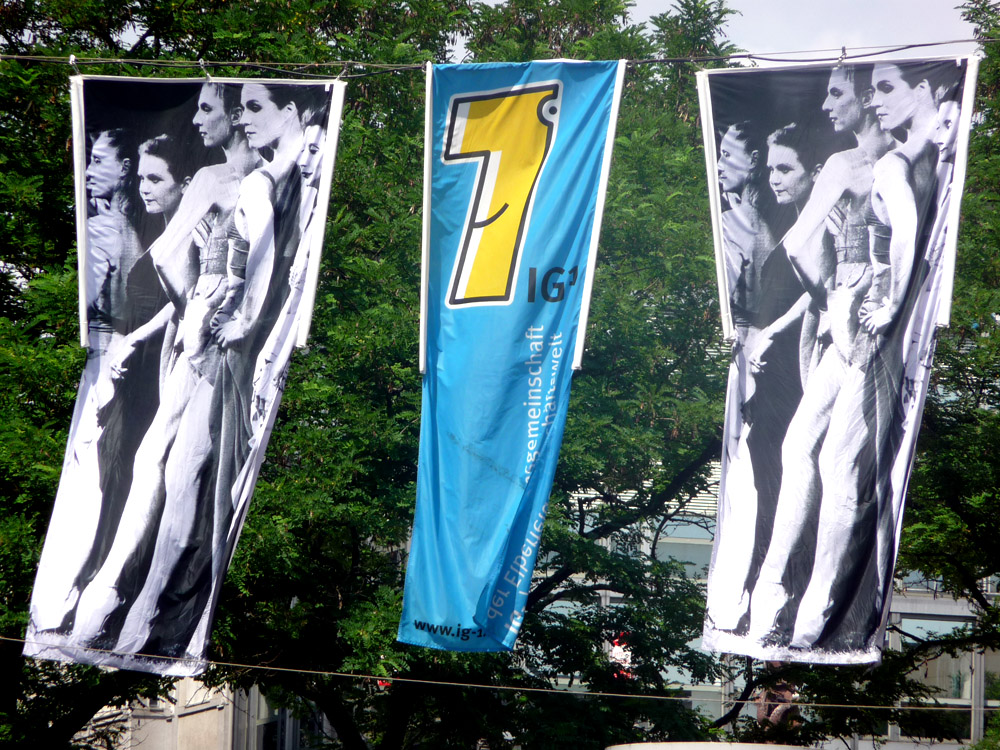 Szenenbild vom Wuppertaler Tanztheater Pina Bausch auf Fahnen in Wuppertal-Elberfeld